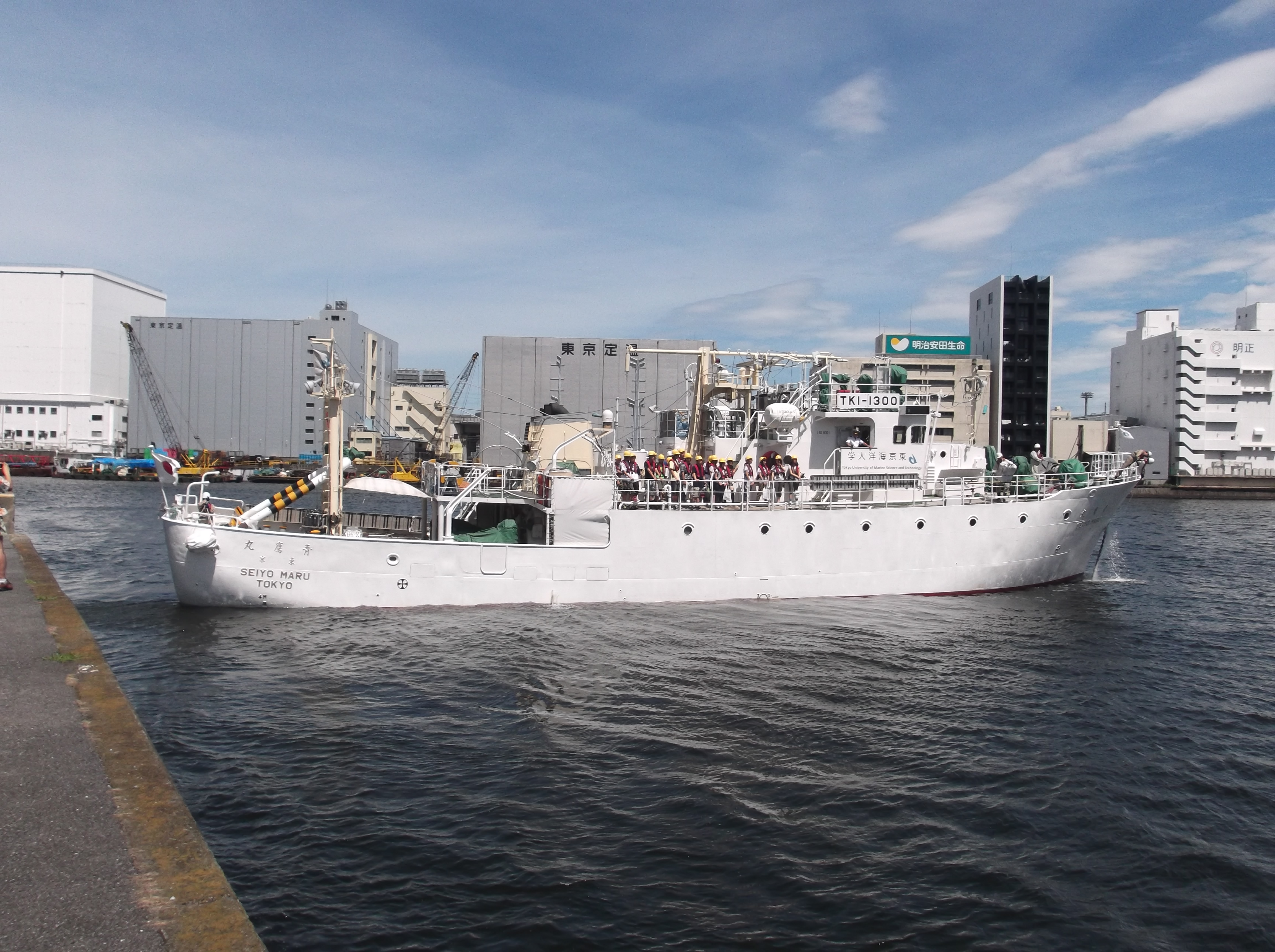 東京海洋大学の練習船・青鷹丸 真横から